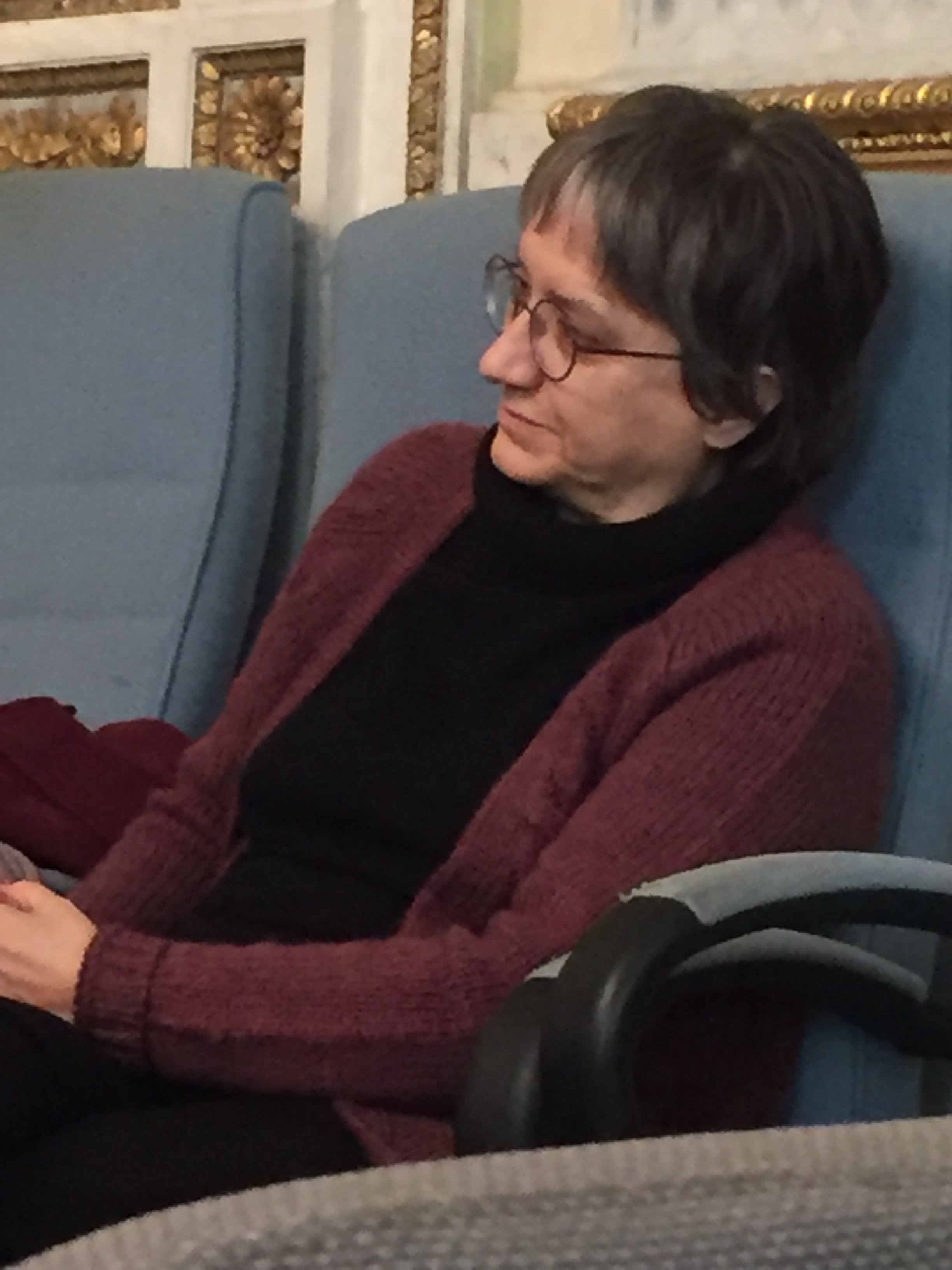 Fotoritratto della storica e critica della fotografia italiana Roberta Valtorta durante un convegno a Palazzo Greppi (Milano)